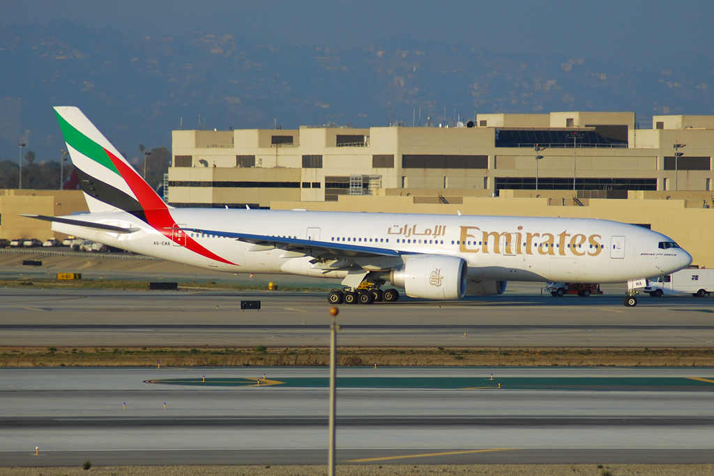 Emirates